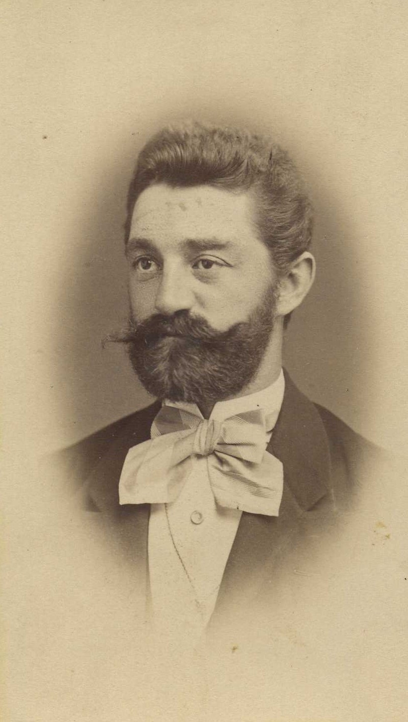 Václav Fabián, poslanec Říšské rady.